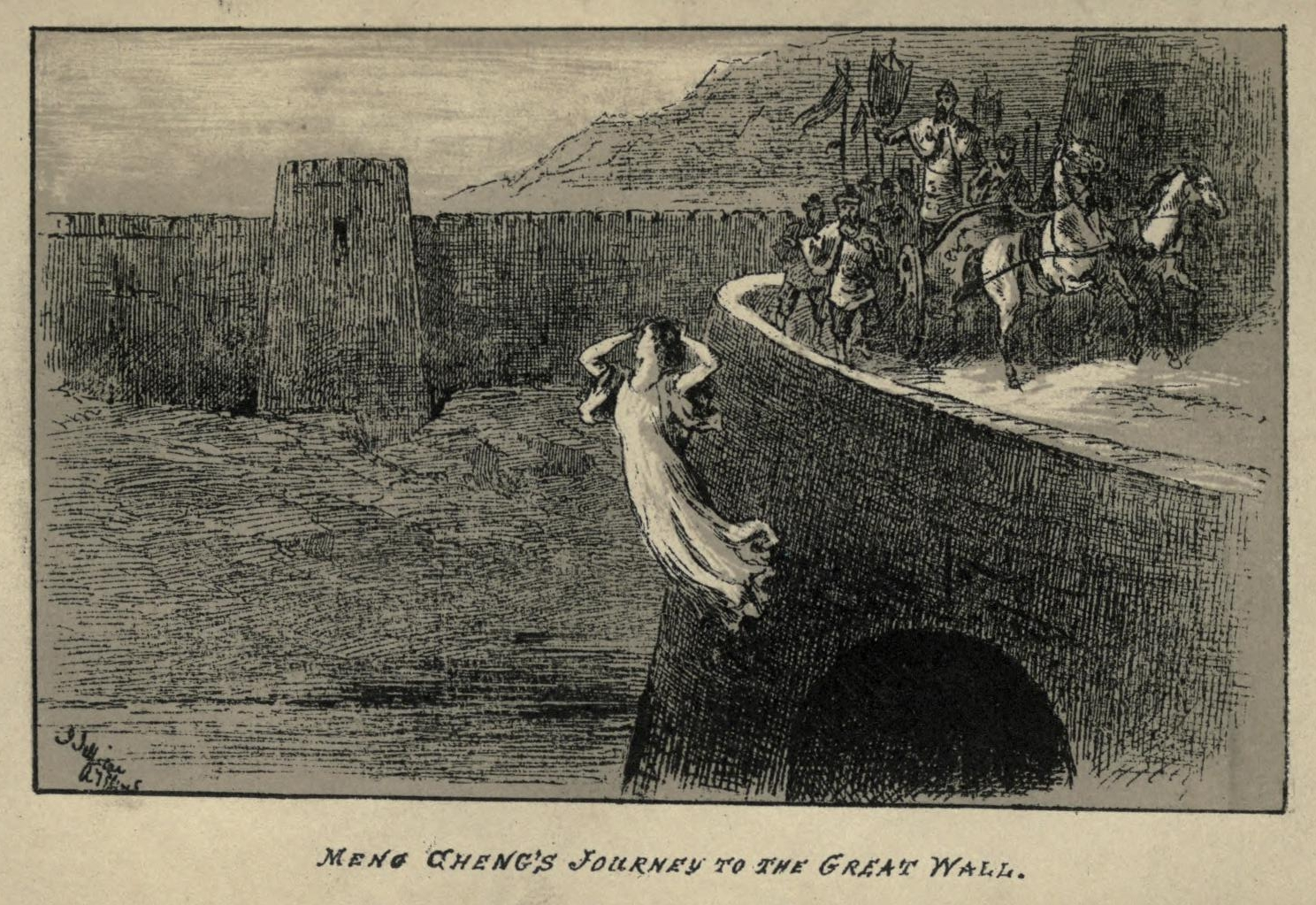 Gravure extraite de George Carter Stent, Entombed Alive and Other Songs, Ballads, etc. (From the Chinese), 1878, page 99